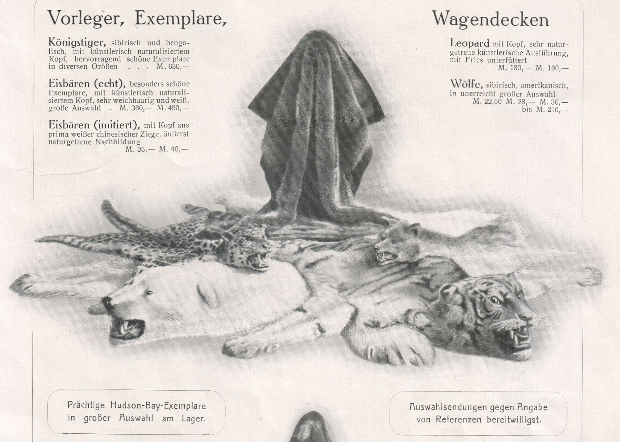 C. A. Herpich Söhne, Berlin, Modewaren 1910 (Prospekt)